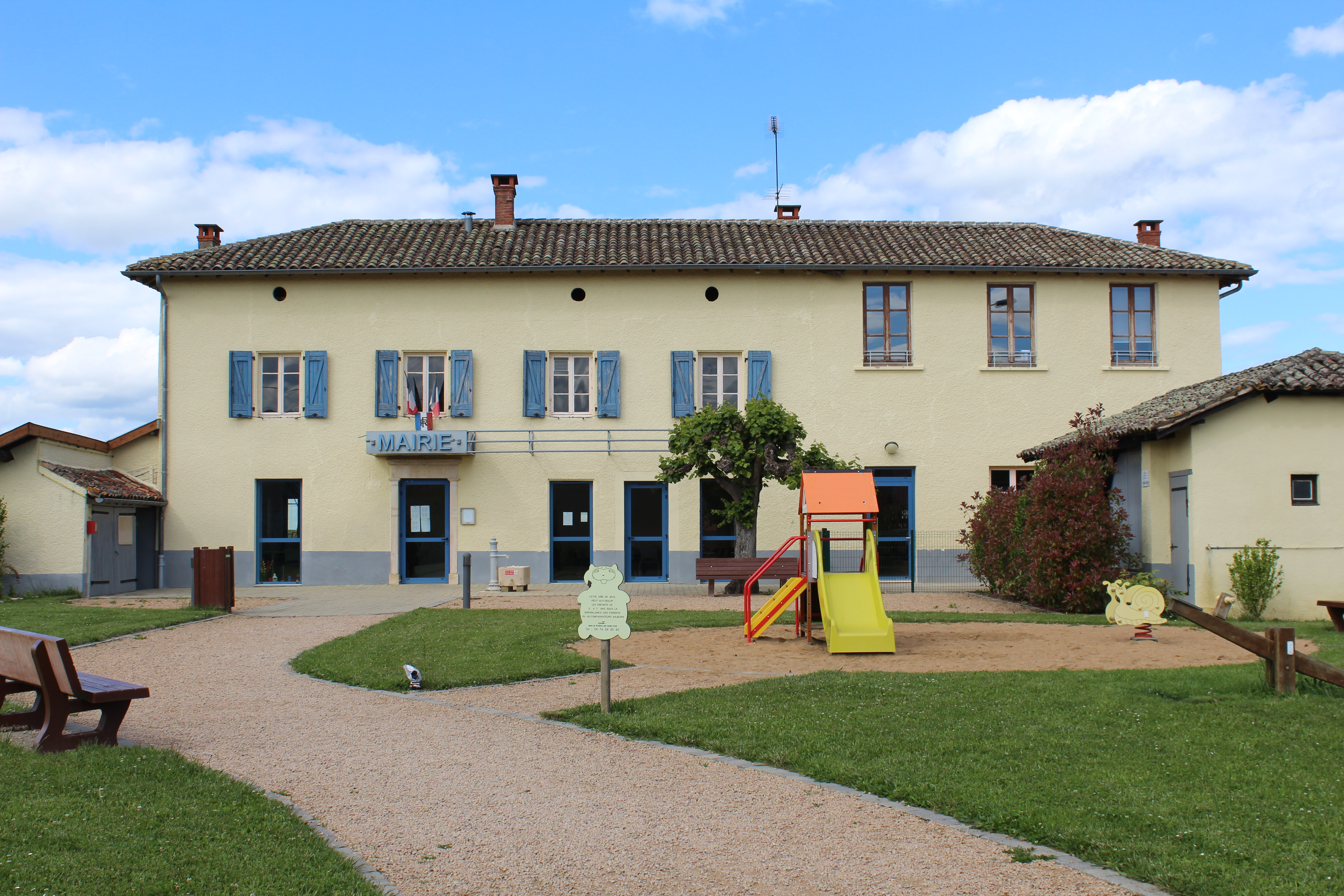 Mairie de Peyzieux-sur-Saône.